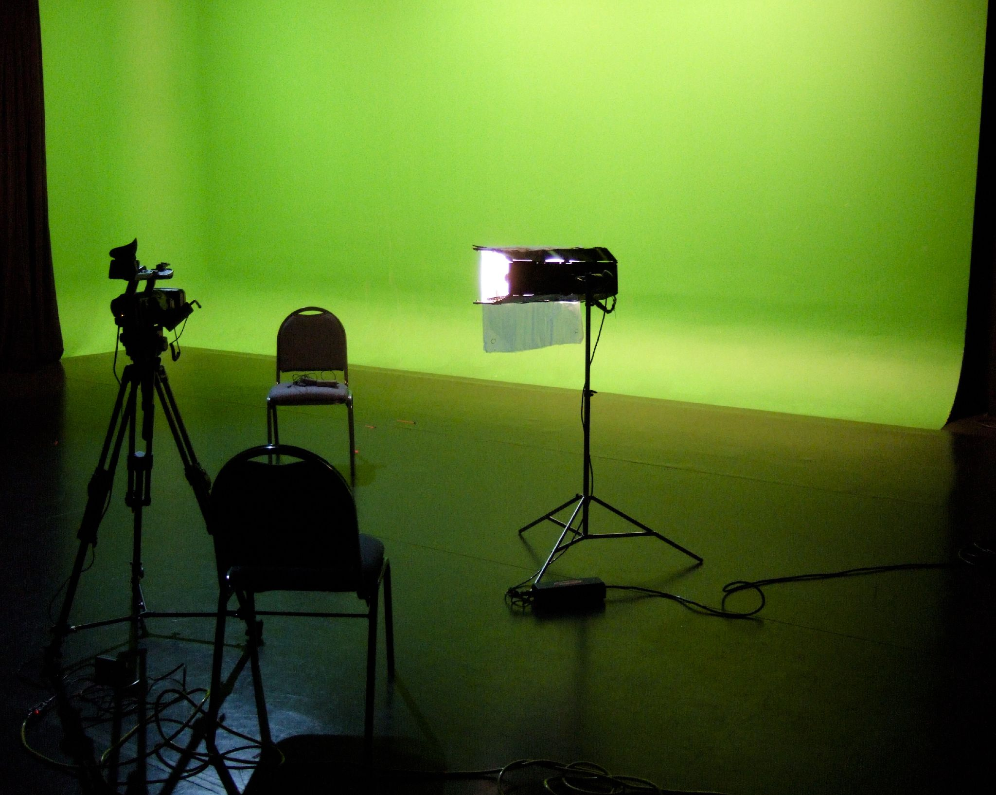 Green room, green screen.